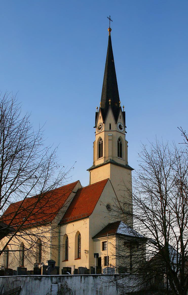 St. Stephanus die Pfarrkirche in Stefanskirchen (Gemeinde Ampfing, Landkreis Mühldorf am Inn, Oberbayern). Die ursprünglich gotische Kirche (einem romanischen Vorgänger folgend) wurde im 18. Jahrhundert barockisiert, 1882-1887 erweitert und im neugotischen Stil umgestaltet (regotisiert). Die letzte Maßnahme bestimmt bis heute das Erscheinungsbild.